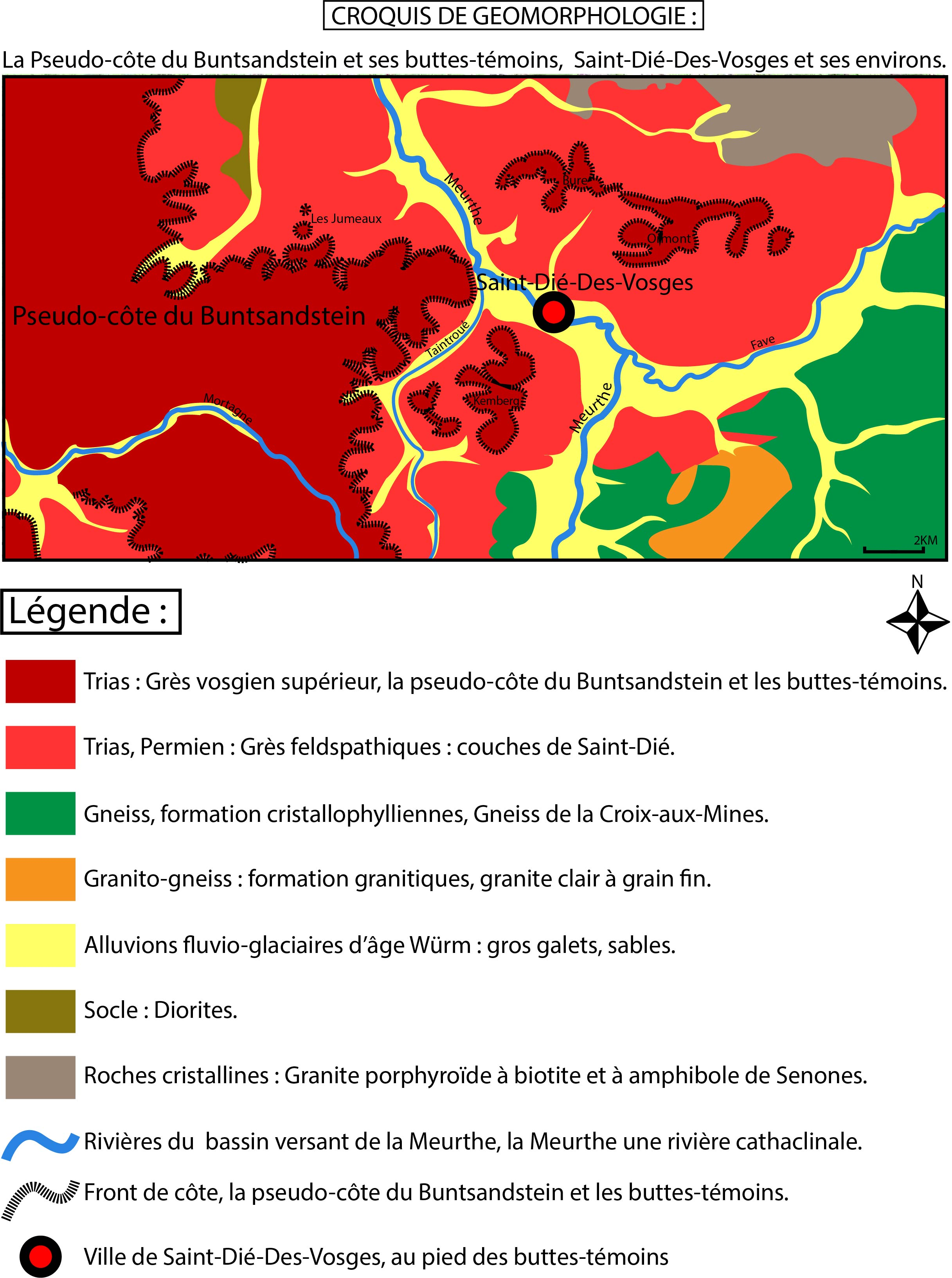 La pseudo-côte du Buntsandstein et ses buttes-témoins et les couches géologiques